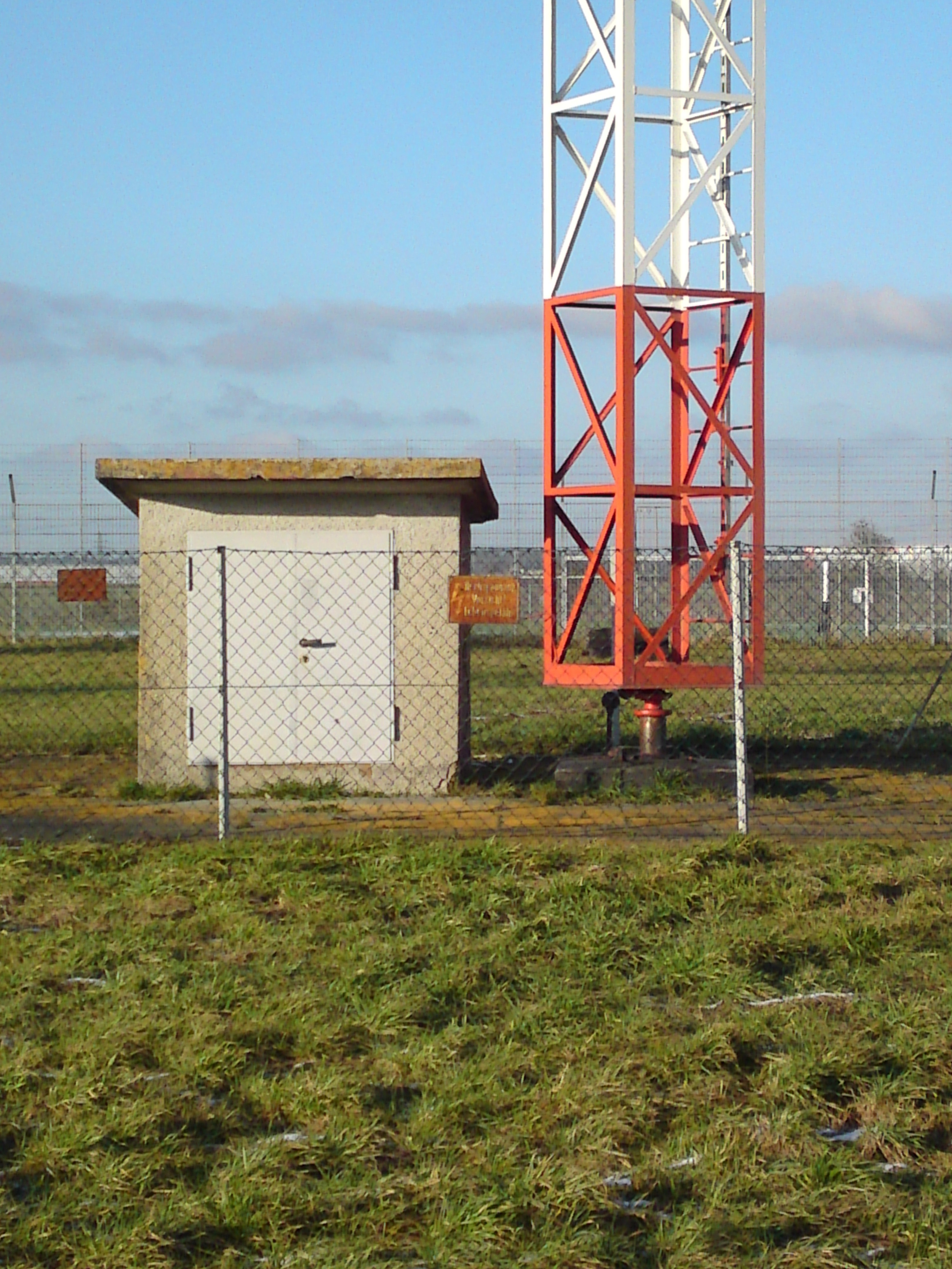 Mastfuss des Senders Ulm-Jungingen.